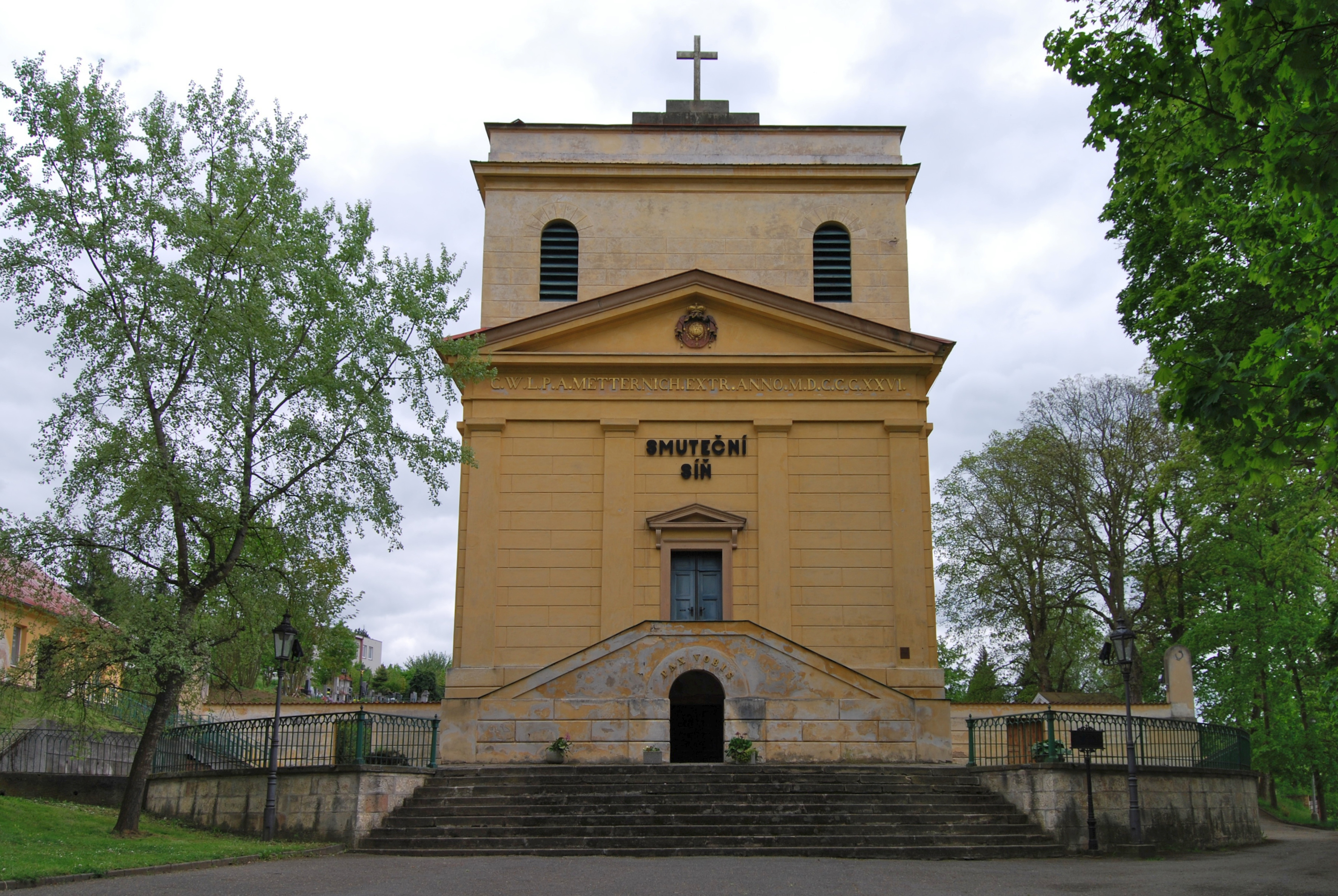 Hřbitovní kostel sv. Václava, později empírově upraven na hrobku rodiny Metternichů za silnicí I/27 v parku. Klášter Plasy v městečku Plasy v okrese Plzeň-sever. Česká republika.